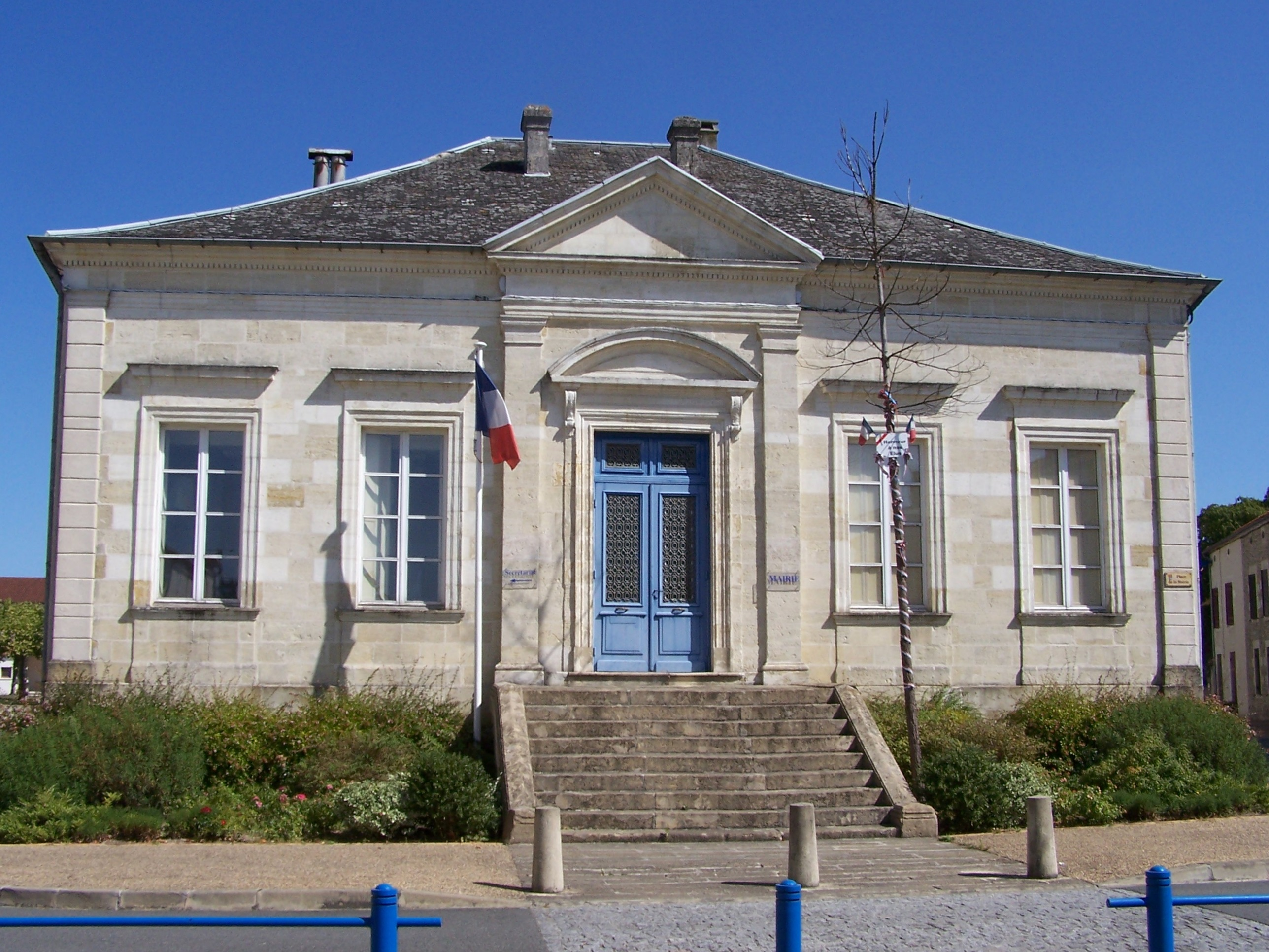 Mairie d'Auros, Gironde, France